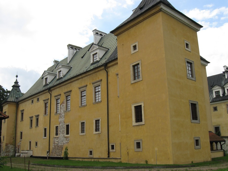 Spytkowice - zespół zamku, 1520-1546, 1622-1643, 1953